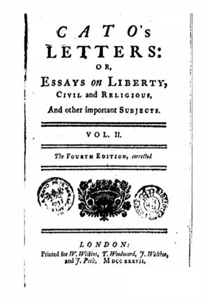 《加图来信》最初出版的封面页